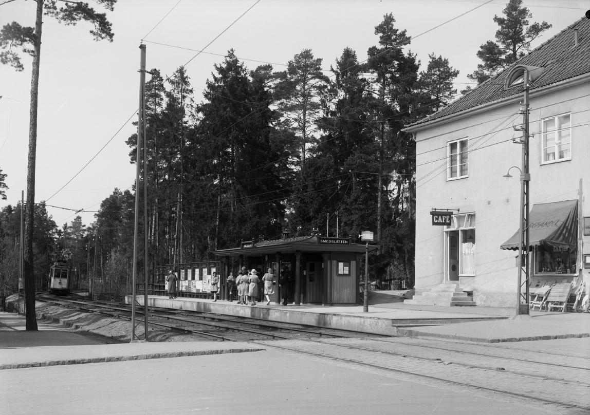 Spårvagnshållplats vid Smedslättstorget i Smedslätten, Bromma. Fotografi från 1931. Objektidentitet: Fotonummer SM 2030-81. Publicerat av: Spårvägsmuseet. Väntpaviljongen ritades av Waldemar Johansson.